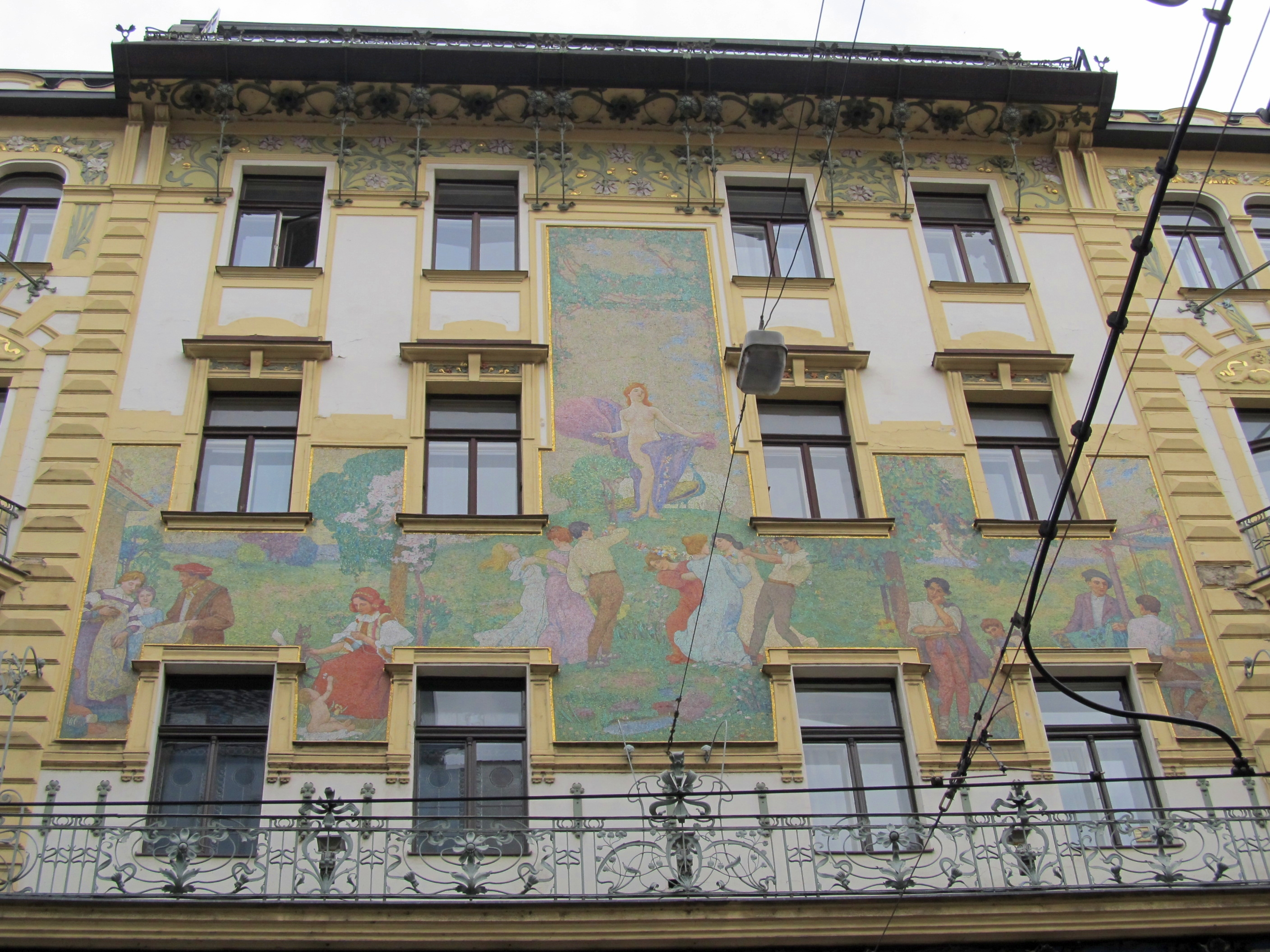 Obchodní dům - polyfunkční objekt U Nováků, U Štajgrů (Nové Město), Praha 1, Vodičkova 28, 30, V Jámě 1, 3, 5 699/28, Nové Město